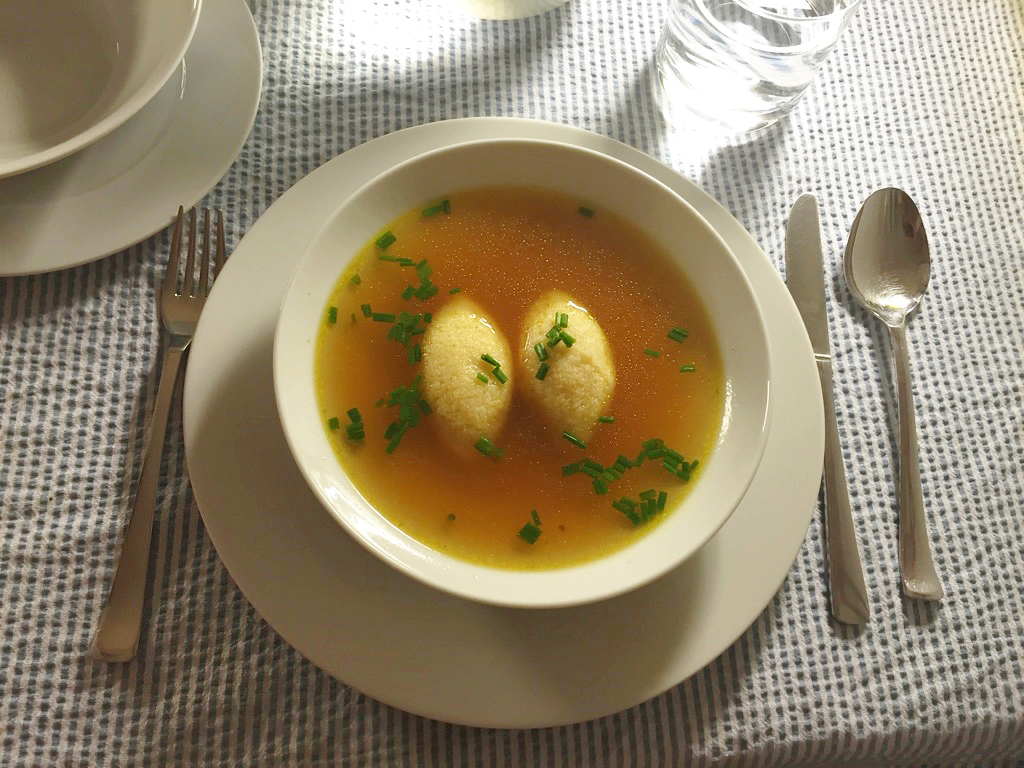 Grießnockerlsuppe